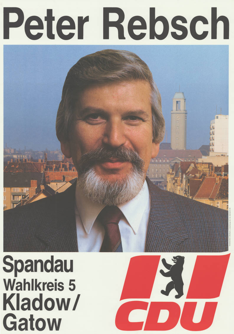 Peter Rebsch Spandau ... CDUAbbildung:Porträtfoto vor typischem Spandauer Stadthintergrund - Berliner BärPlakatart:Kandidaten-/Personenplakat mit PorträtAuftraggeber:Verantw.: CDU BerlinObjekt-Signatur:10-004 : 681Bestand:Plakate zu Abgeordnetenhauswahlen Berlin (10-004)GliederungBestand10-18:Plakate zu Abgeordnetenhauswahlen Berlin (10-004) » CDULizenz:KAS/ACDP 10-004 : 681 CC-BY-SA 3.0 DE